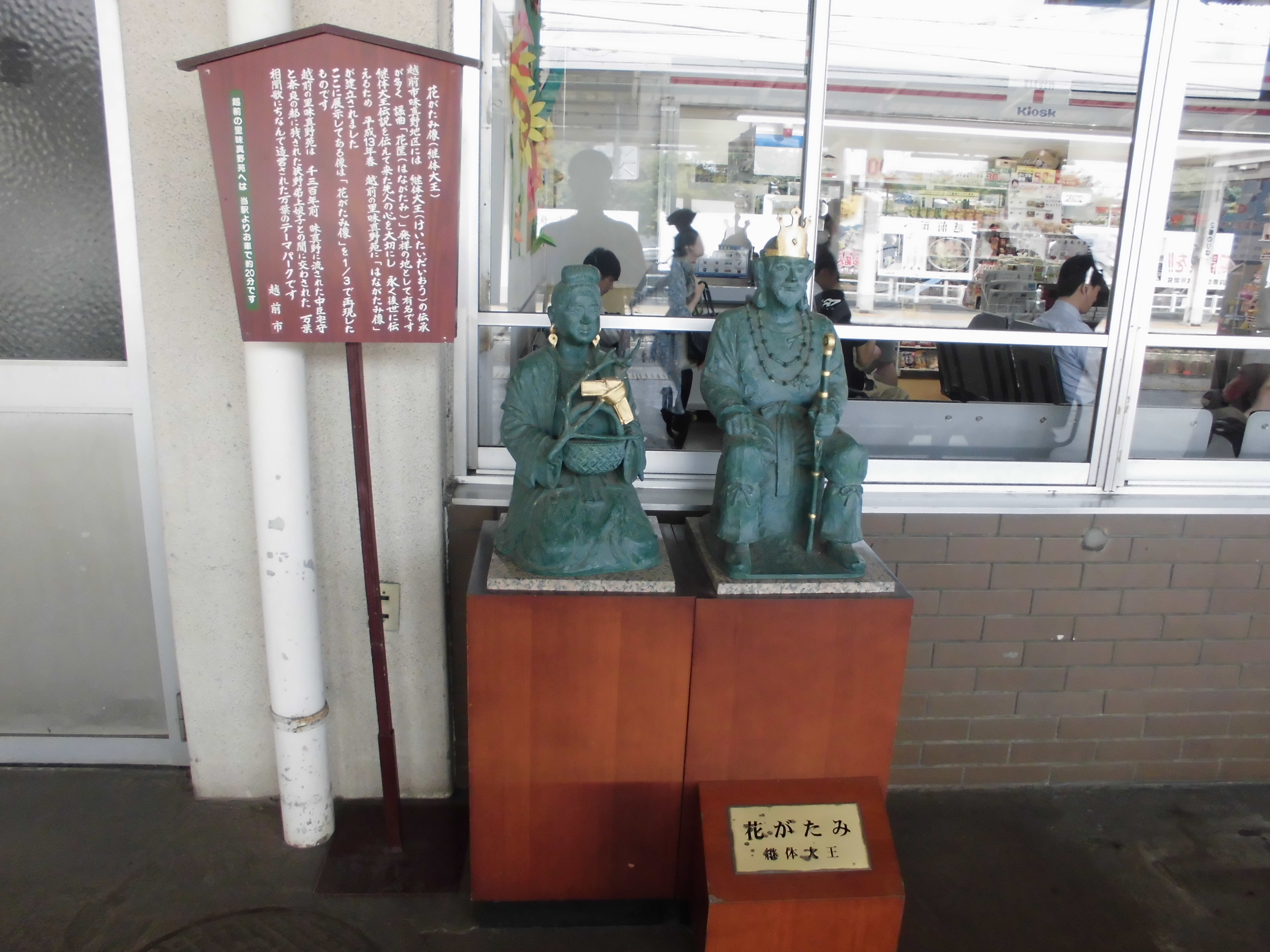 中文（香港）: 花筐 繼體天皇